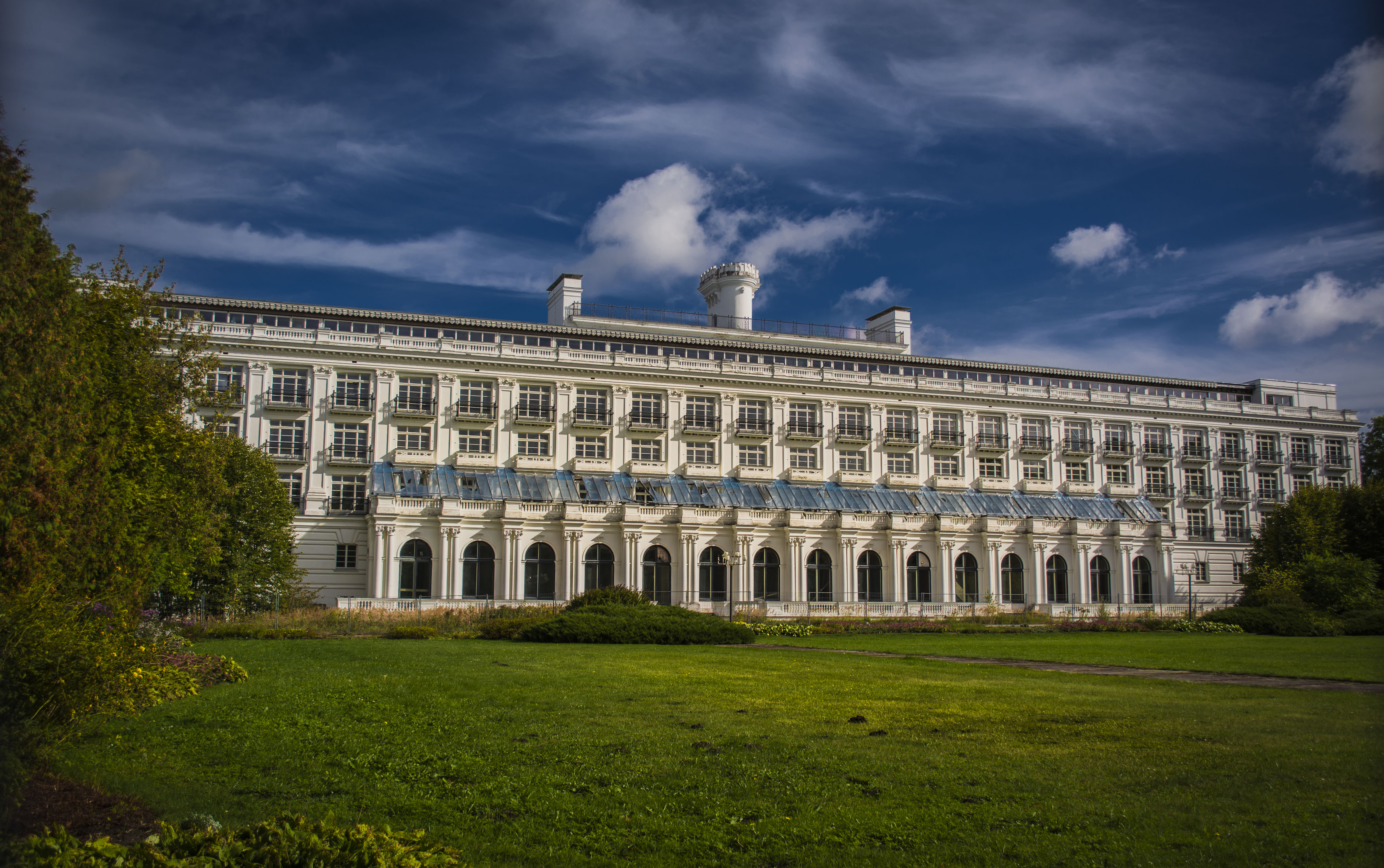 Ķemeru kūrorts, Jūrmala